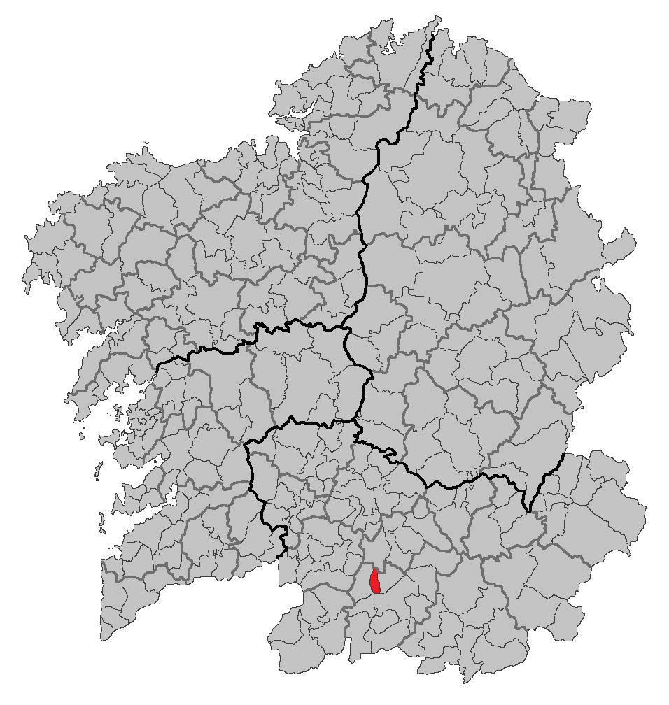 Mapa coa localización do concello de Vilar de Santos.